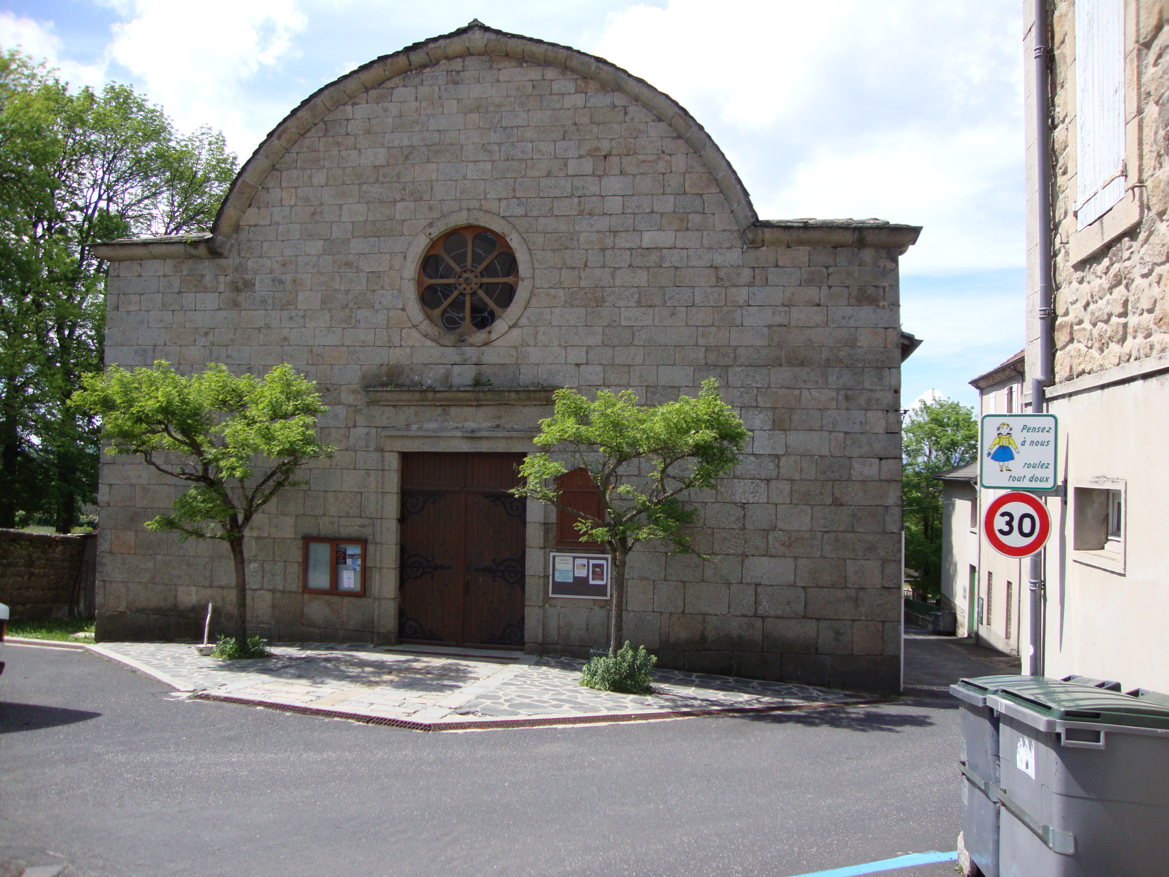 St.Agrève (Ardêche, Fr) temple.